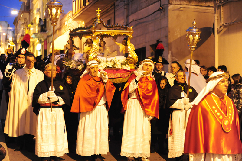 Confratelli del Rosario portano la Bara di Gesù Morto, Venerdì Santo a Mottola